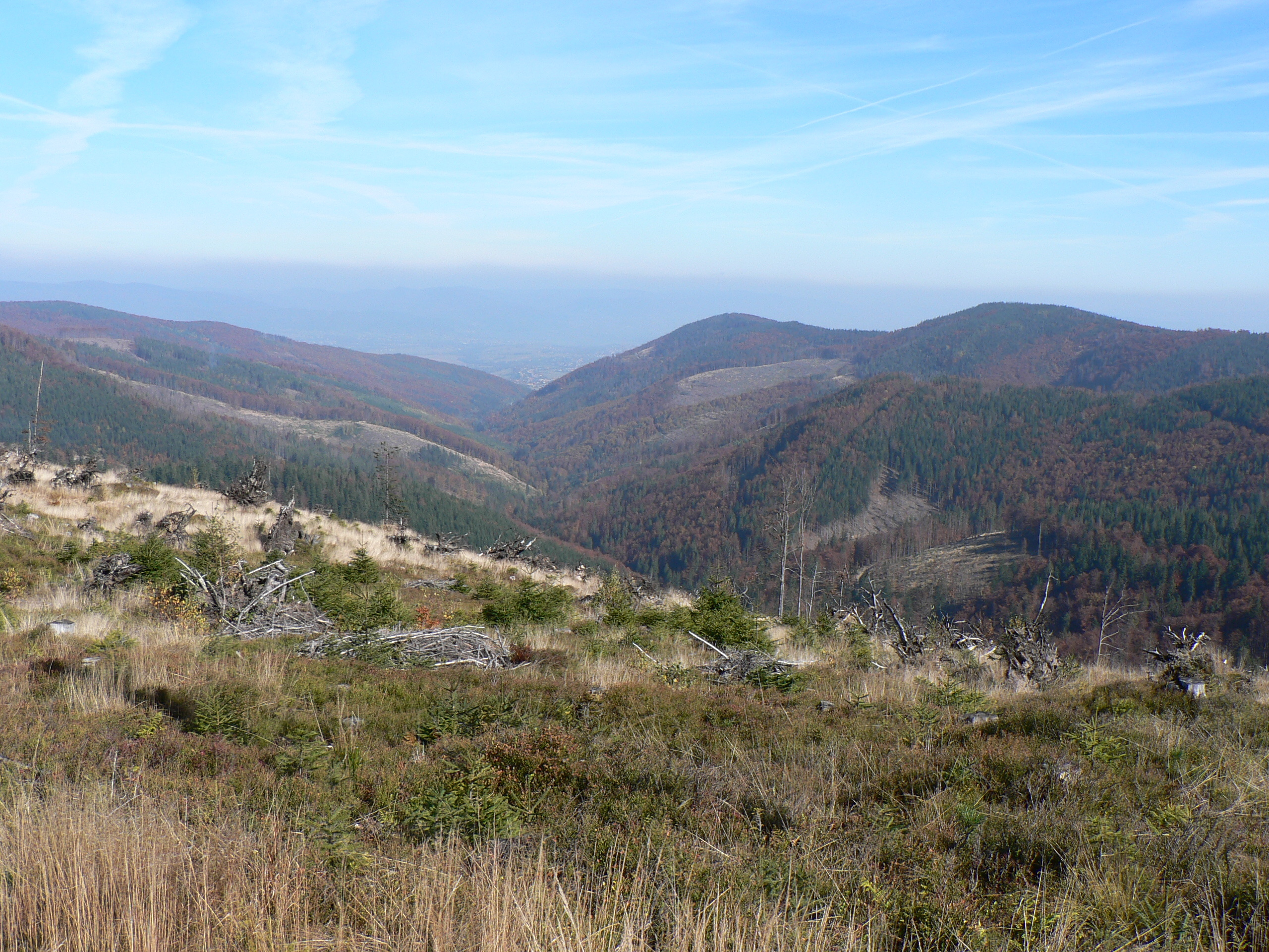 Ostre i Murońka ze szlaku Skrzyczne – Barania Góra, gdzieś pomiędzy Malinowską Skałą a Zielonym Kopcem